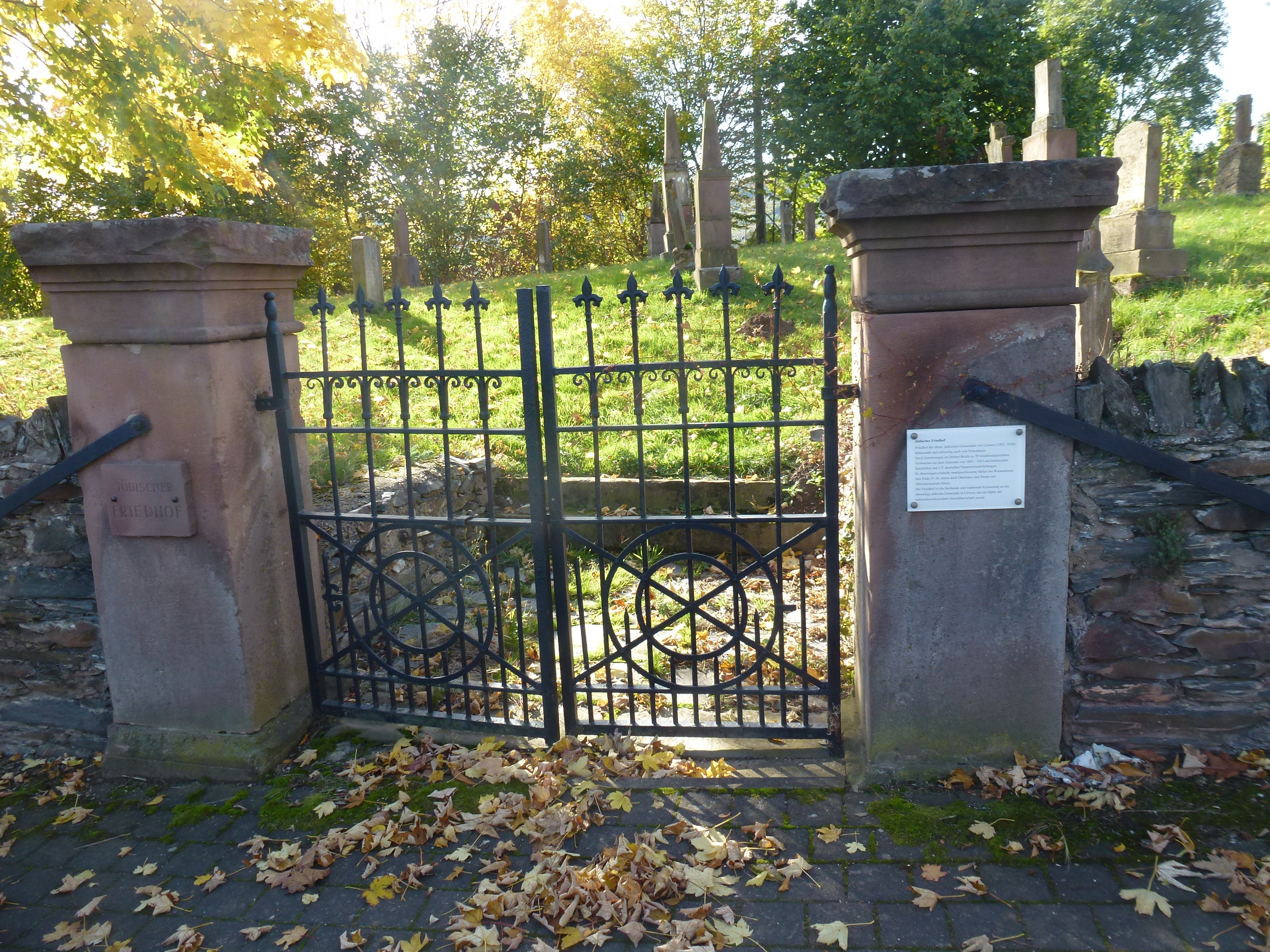 Jüdischer Friedhof Detzemer Straße Leiwen